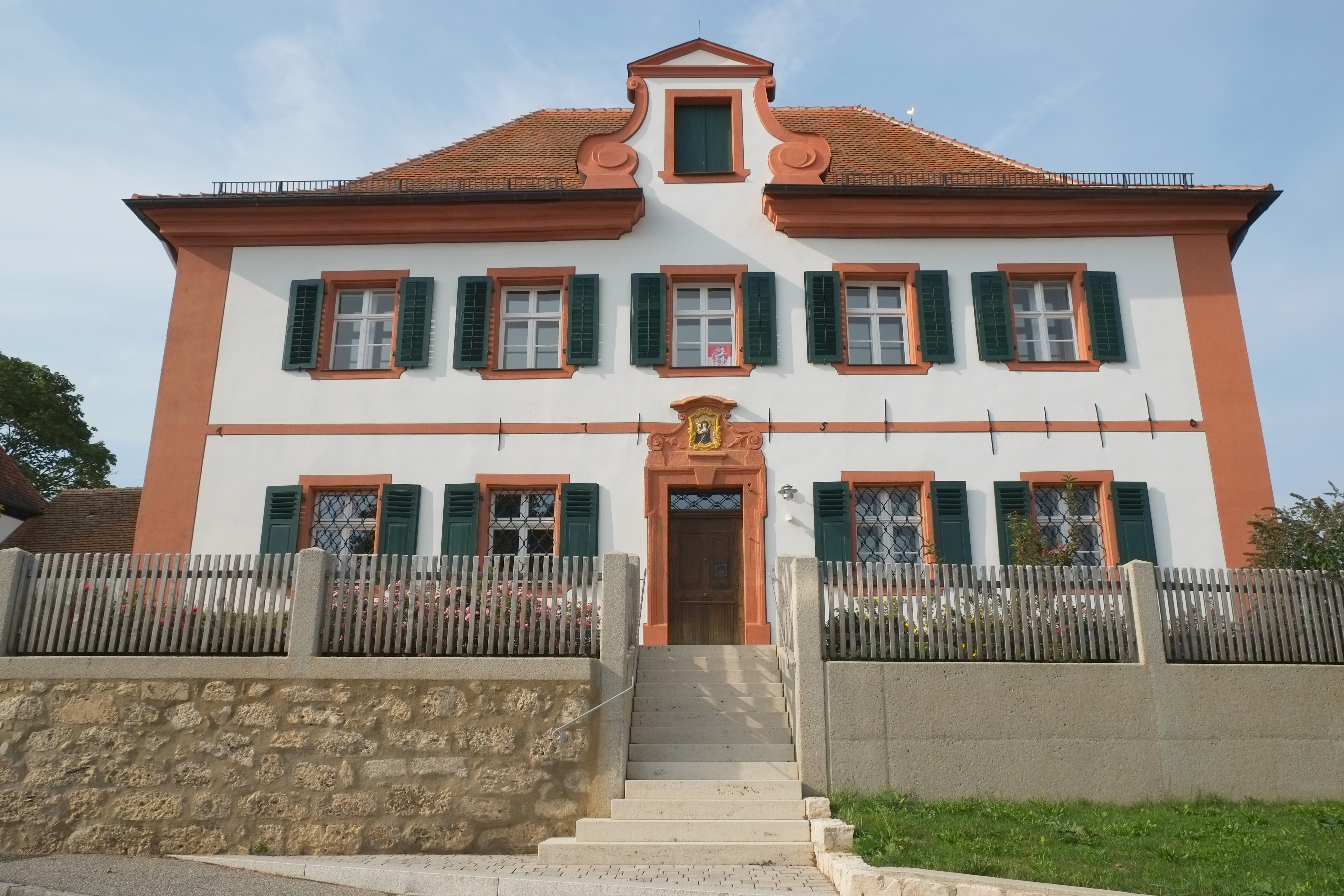 Pfarrhaus in Utzwingen, einem Ortsteil von Maihingen im Landkreis Donau-Ries (Bayern, Deutschland)